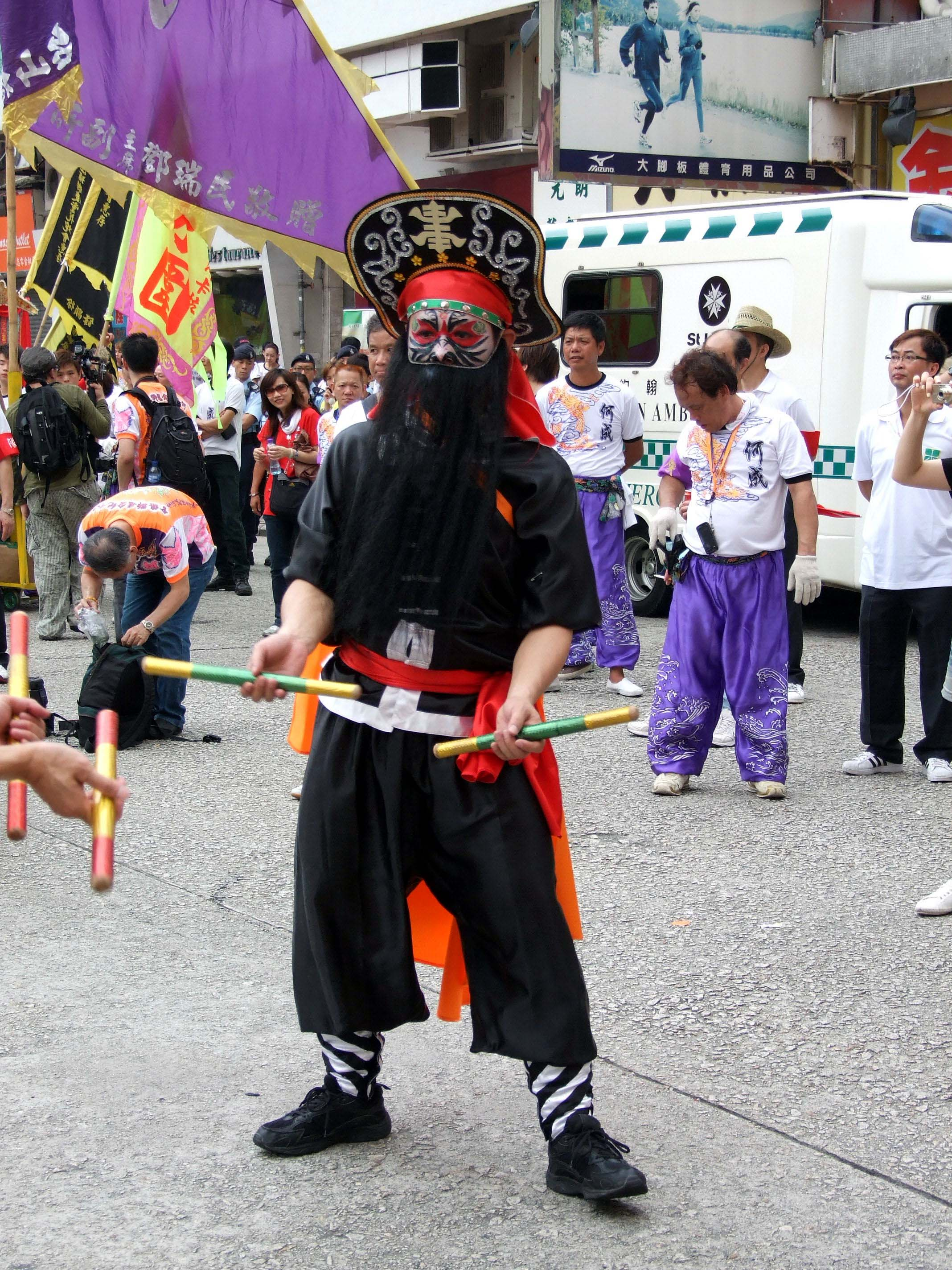 英歌黑面黑须的“二槌”